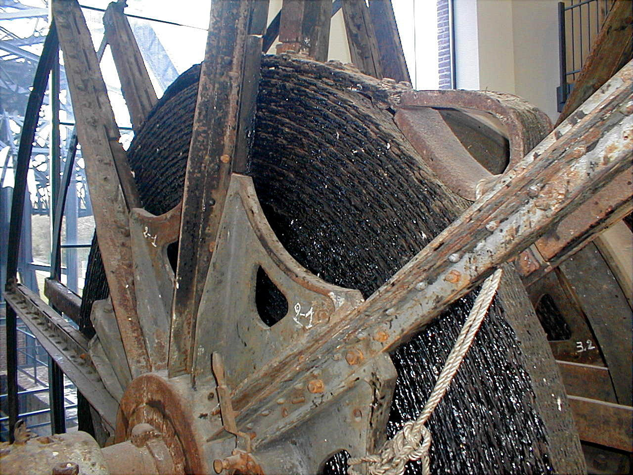 Salle des machines détail de l'enroulement du câble plat